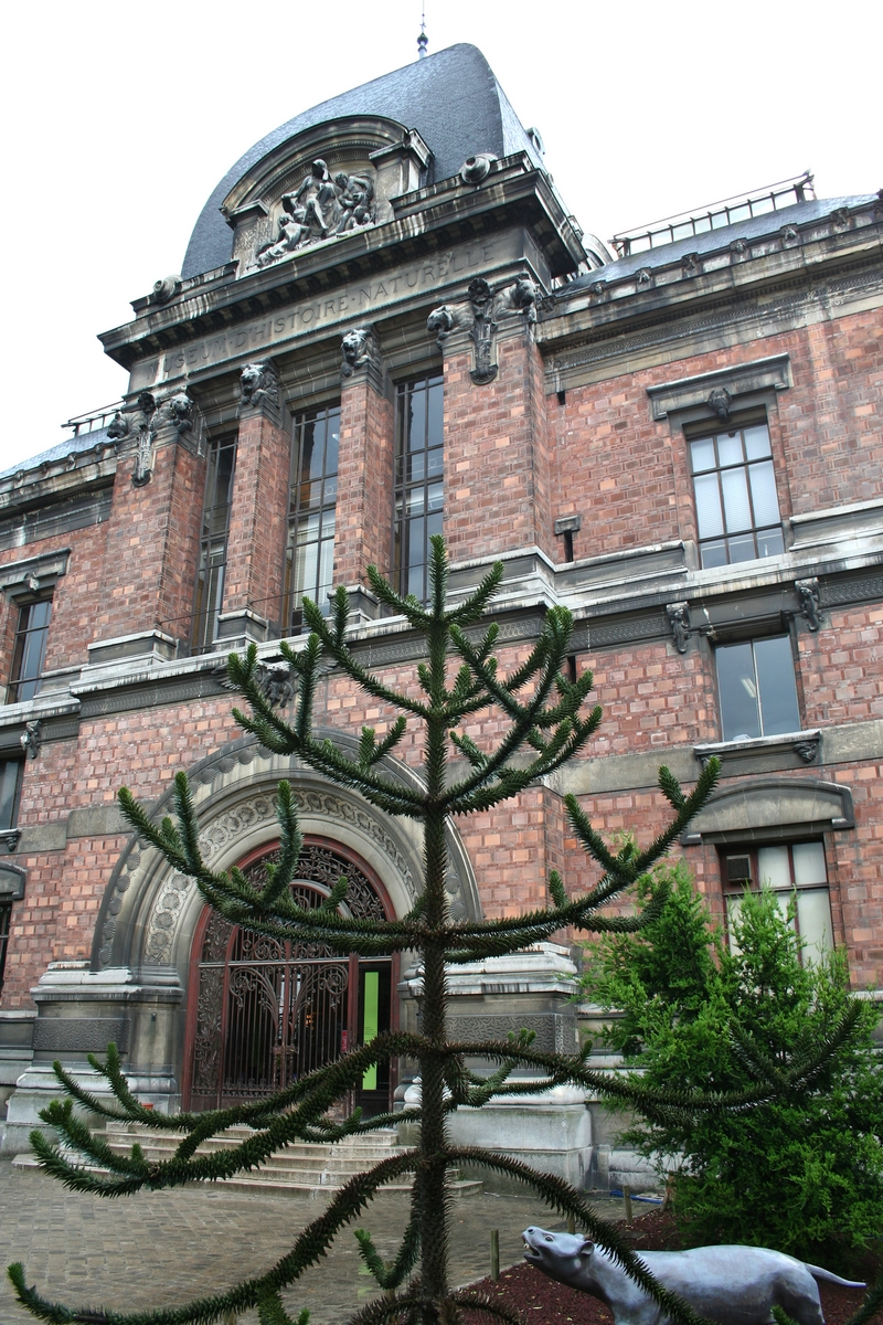 Façade principale de la galerie de Paléontologie et d'Anatomie comparée, au Jardin des plantes, à Paris, dans le 5e arrondissement.